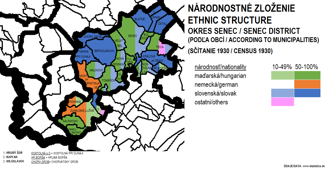 Národnostné zloženie okresu Senec (podľa sčítania v roku 1930).